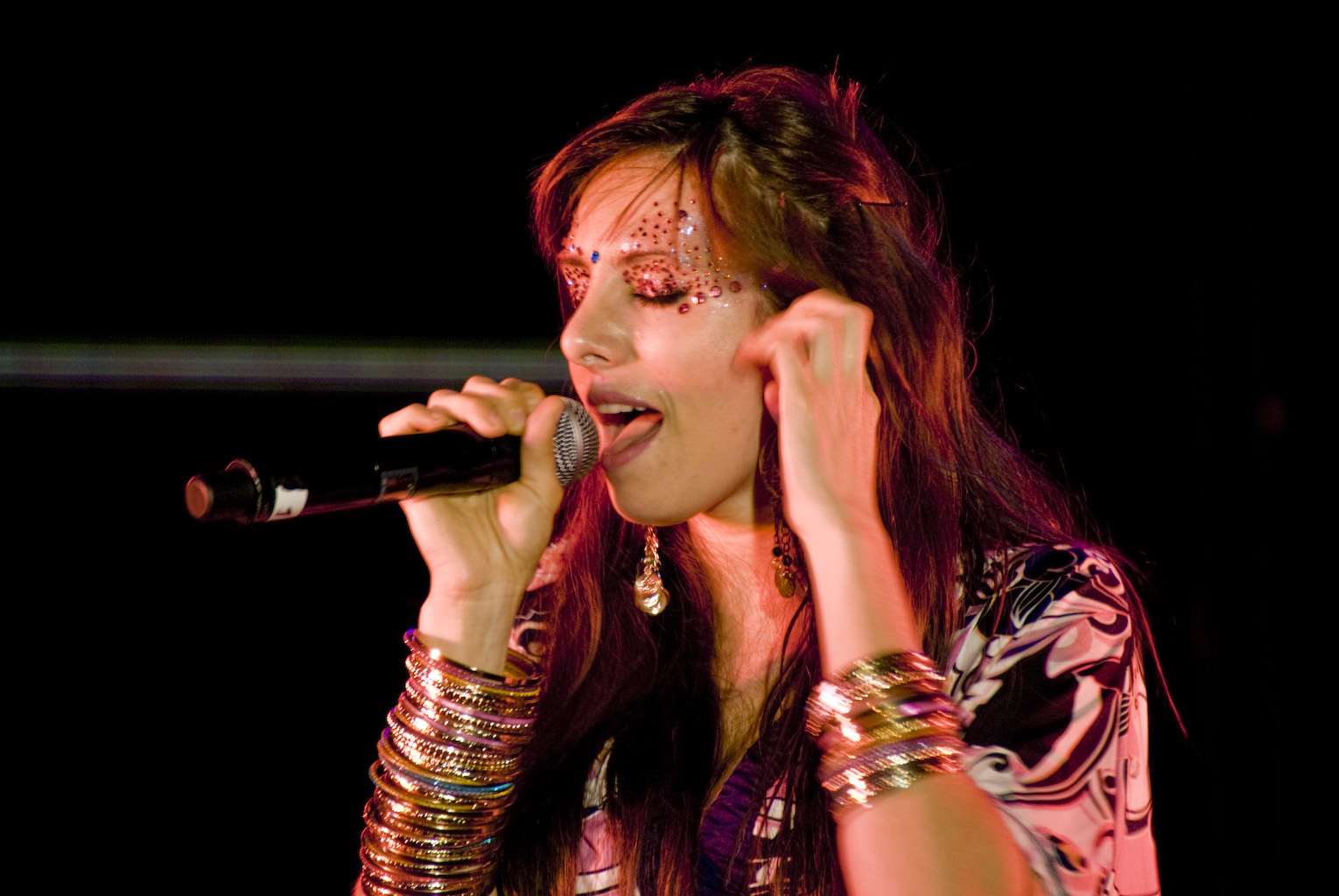 Mala Rodríguez